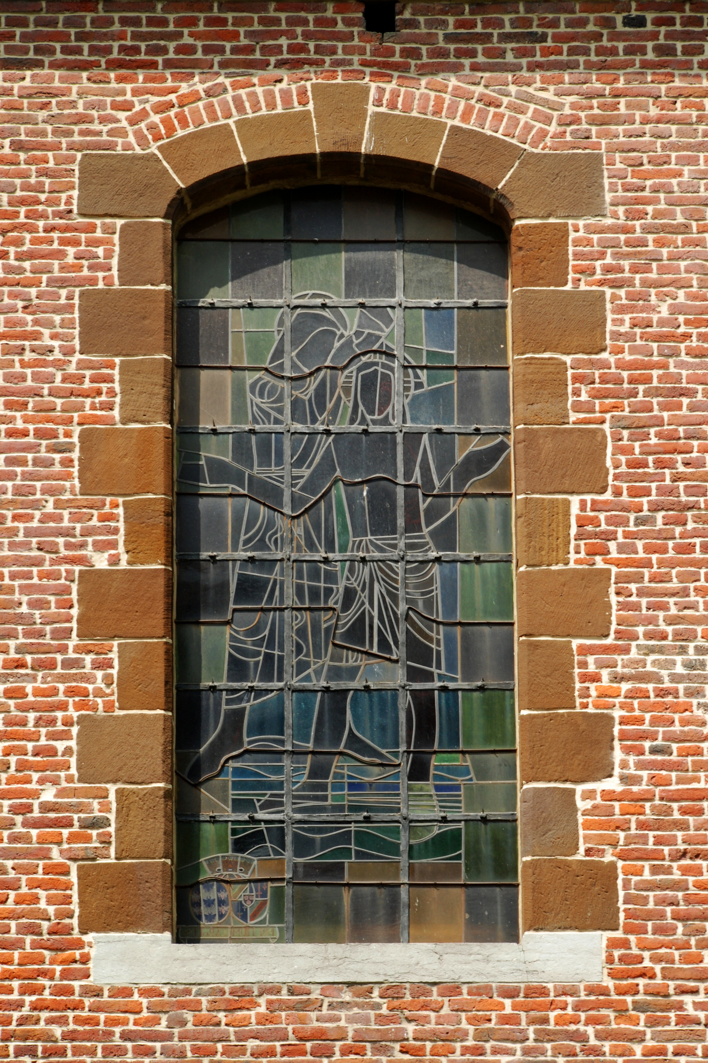 Belgique - Brabant wallon - Ottignies - Église Saint-Rémy